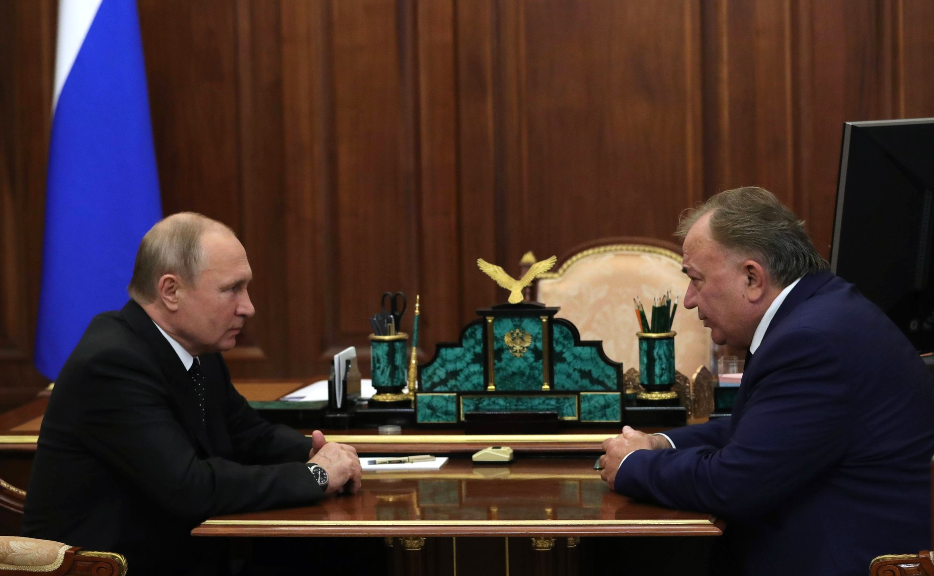 ГӀалгӀай: Владимир Путинеи Килиматанаькъан Махьмуд-Iаьлеи вIашагIкхетар